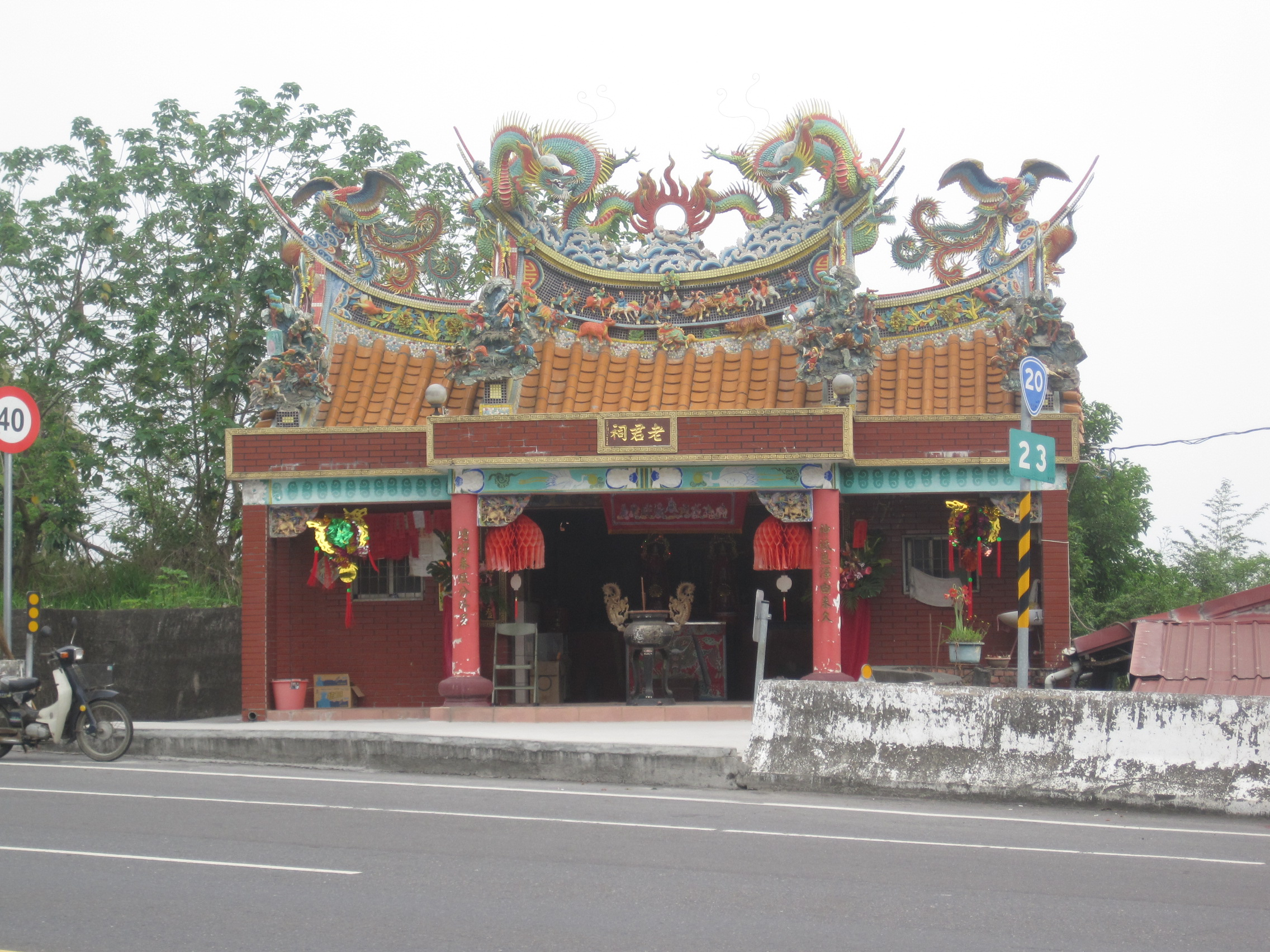 位於臺灣臺南市左鎮區的老君祠